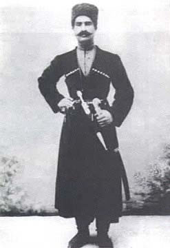 Reza Savad-Koohi, futur Reza Chah, alors colonel de la Brigade Cosaque Persane, en 1917